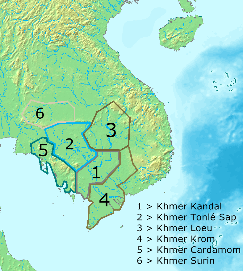 Répartition de la Langue Khmère.